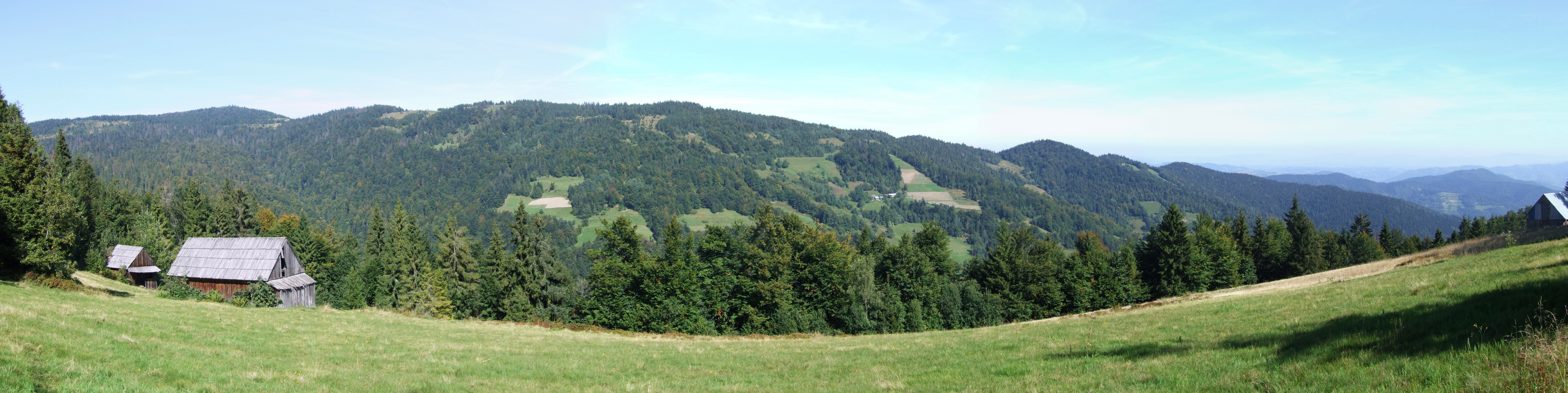 Grzbiet Strzelowskie i dolina Potyoku Gorcowego w Ochotnicy Dolnej. Widok z grzbietu Piorunowca